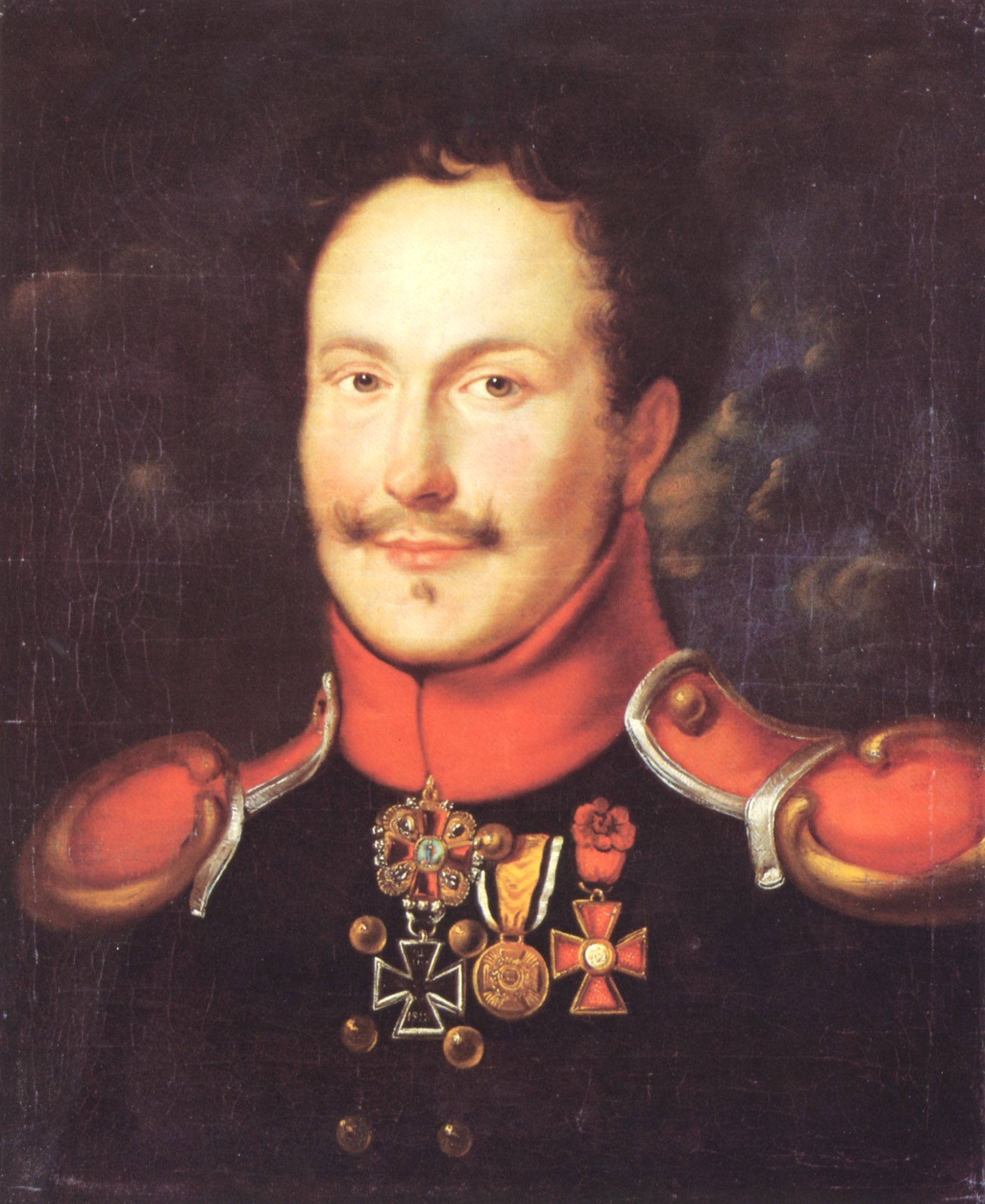 Portrait of Friedrich de la Motte-Fouqué in Husarenuniform